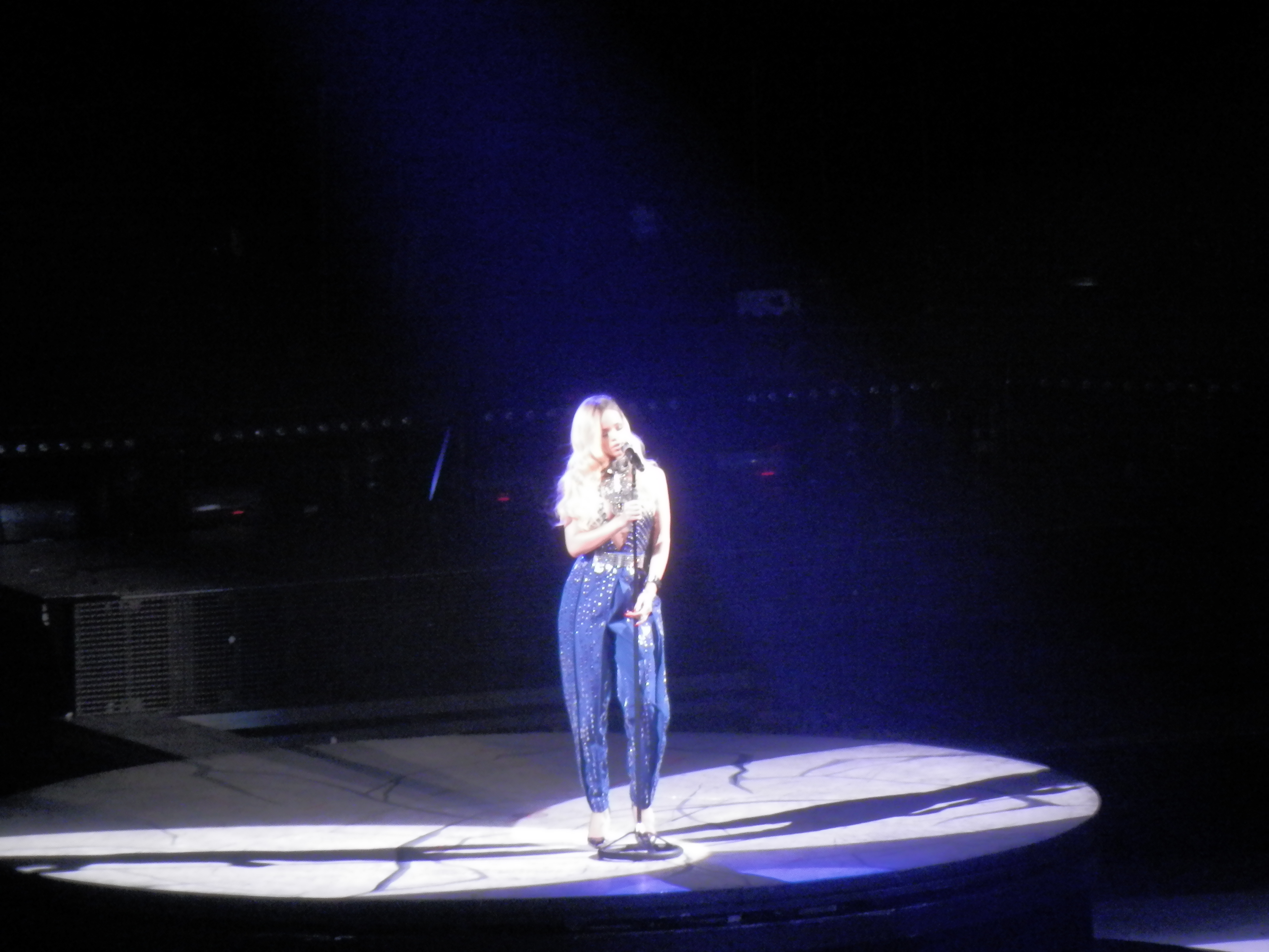 Concerto de Rihanna no MEO Arena, em Lisboa, Portugal, durante a Diamonds World Tour.